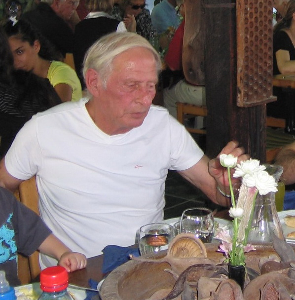 אריה בודנהיימר